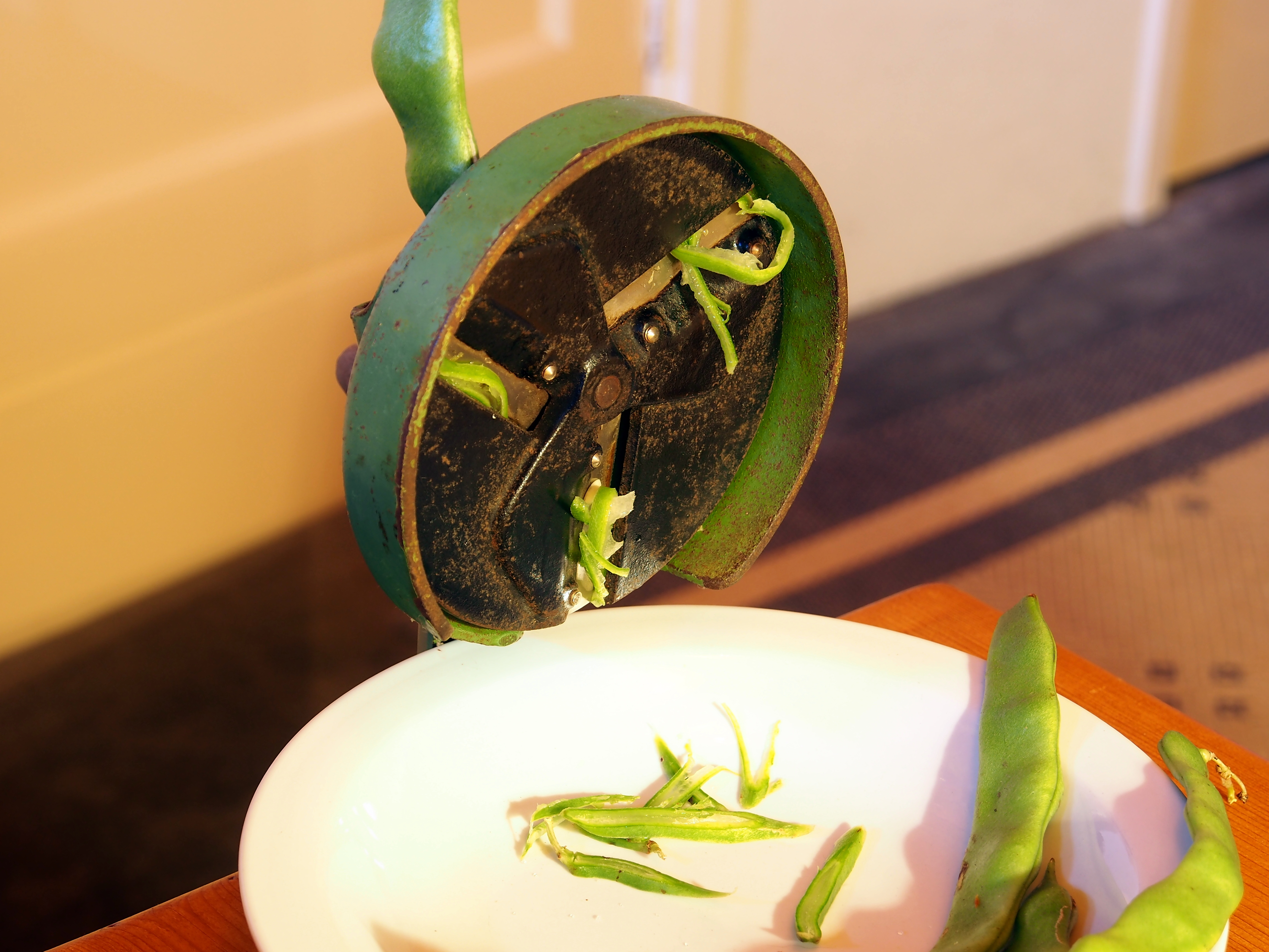 PeDe Snijboon snijmachine.